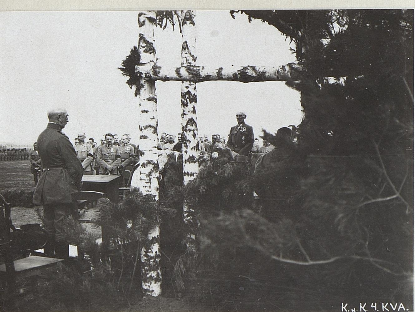 Feldmesse mit Generaloberst Kirchbach in Wladimir Wolinsky